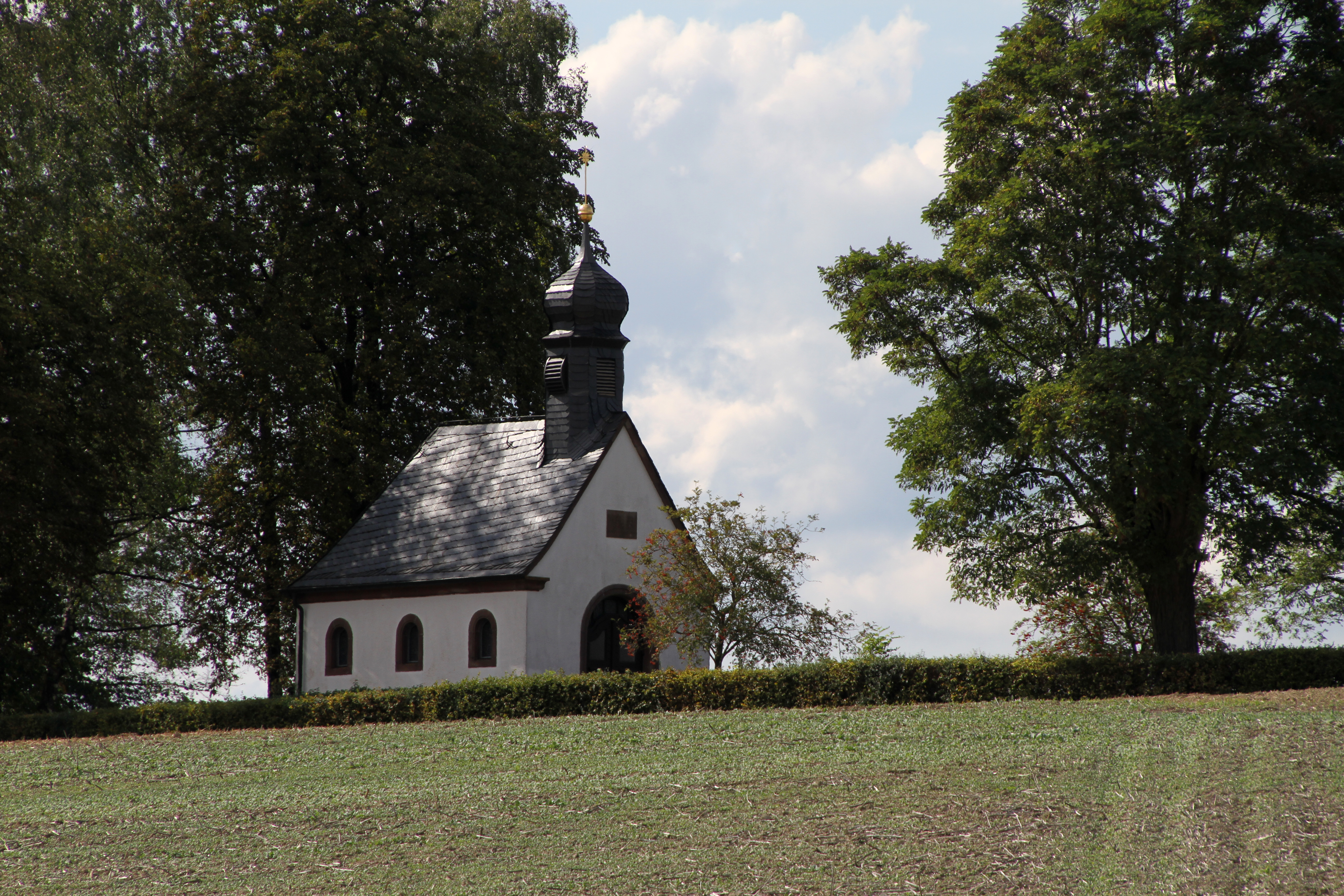 Reifenberg, Kriegergedächtniskapelle; östlich der Ortslage auf dem Häselberg; kleiner Putzbau, 1925.